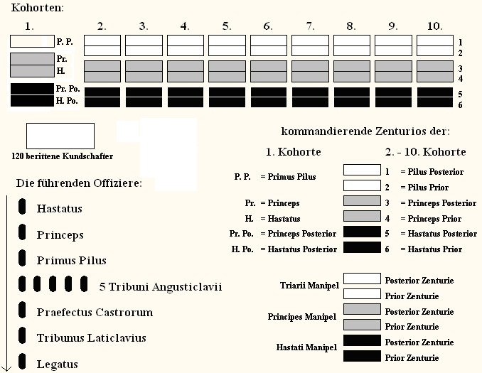 Grafik zur Struktur und Organisation der römischen Legion zur Kaiserzeit